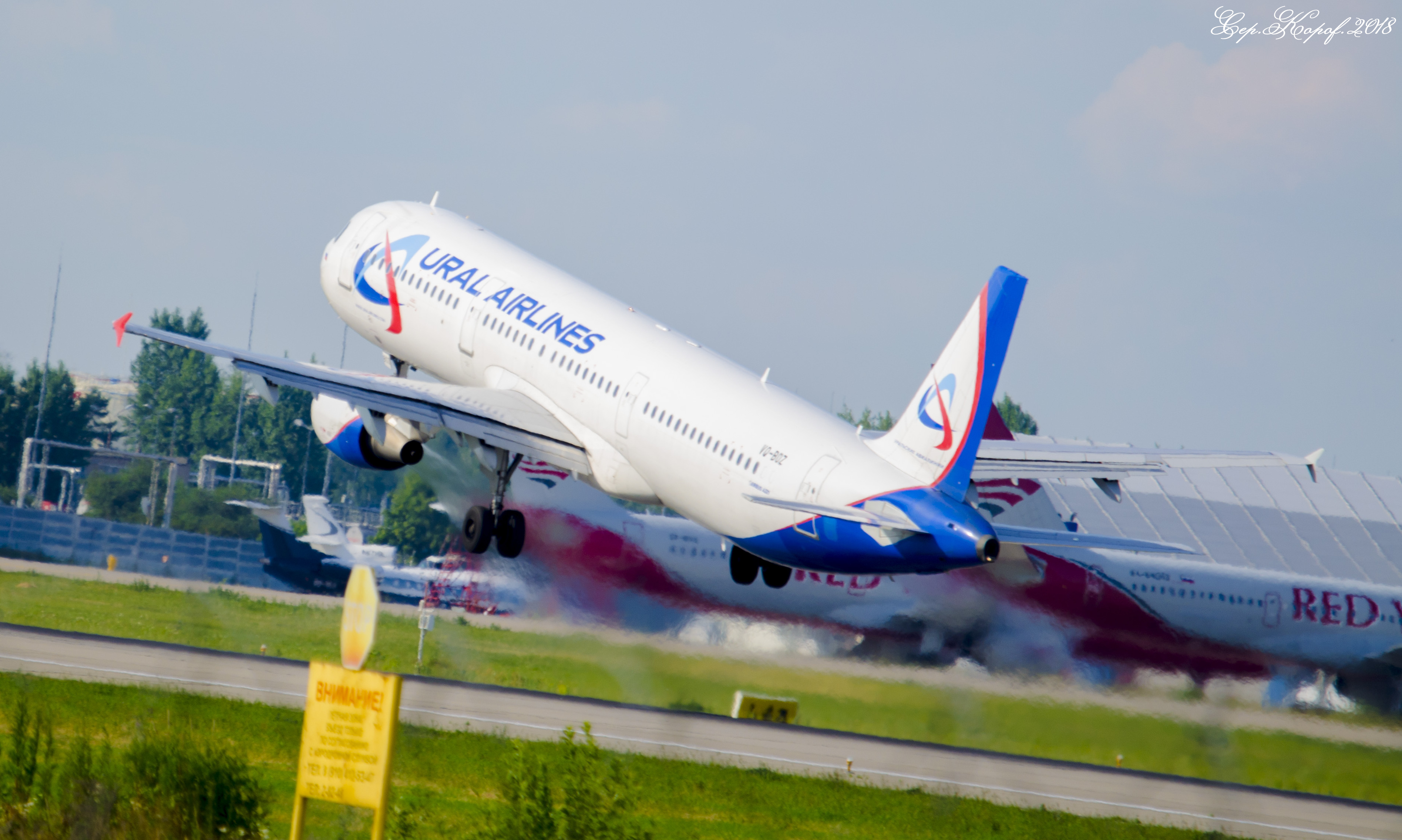 Домодедовская прогулка : Domodedovo walk